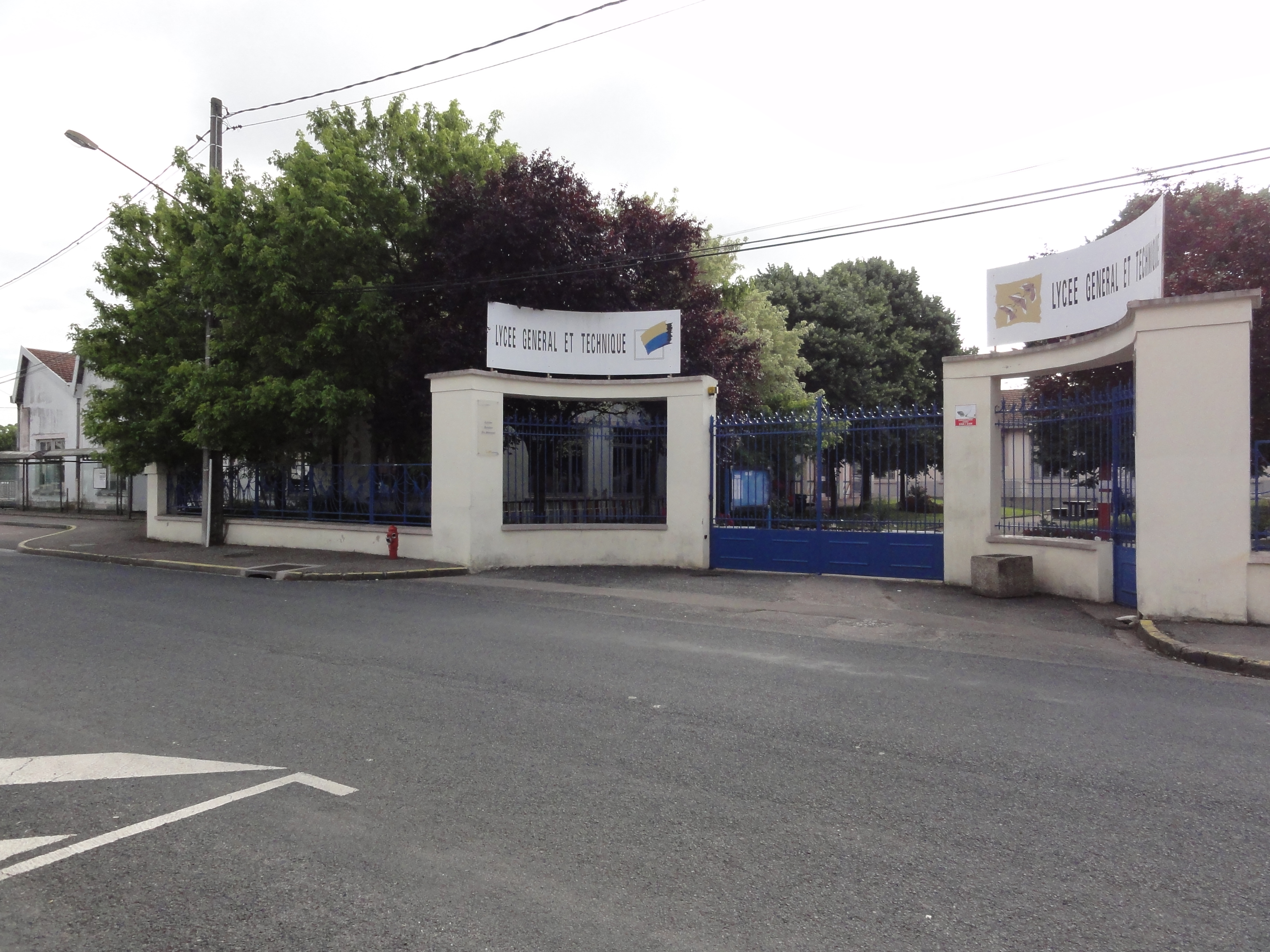 Lunéville (M-et-M) entrée lycée géneral et technique